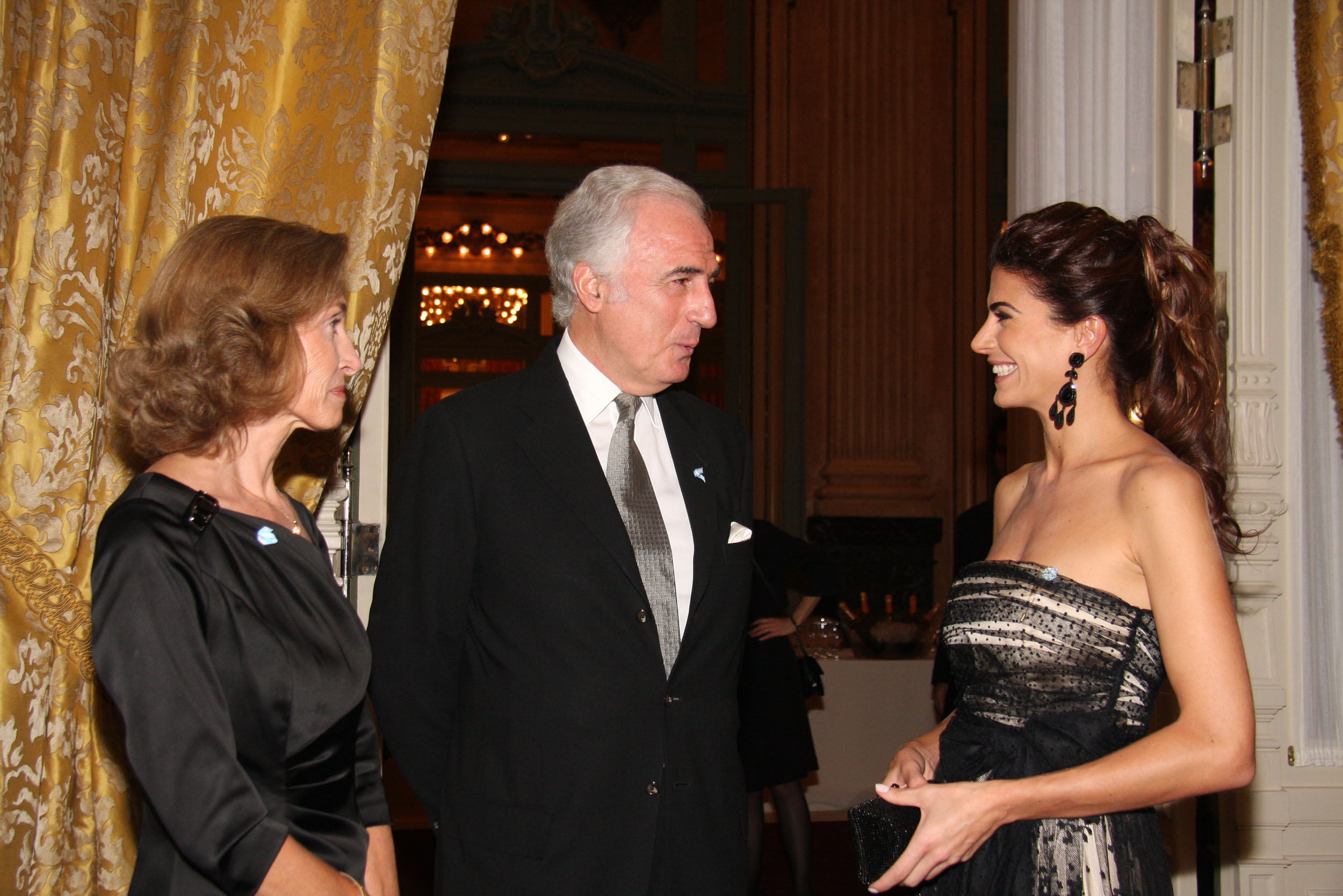 Gala de reapertura del Teatro Colón. Juliana Awada y Jorge Domínguez.